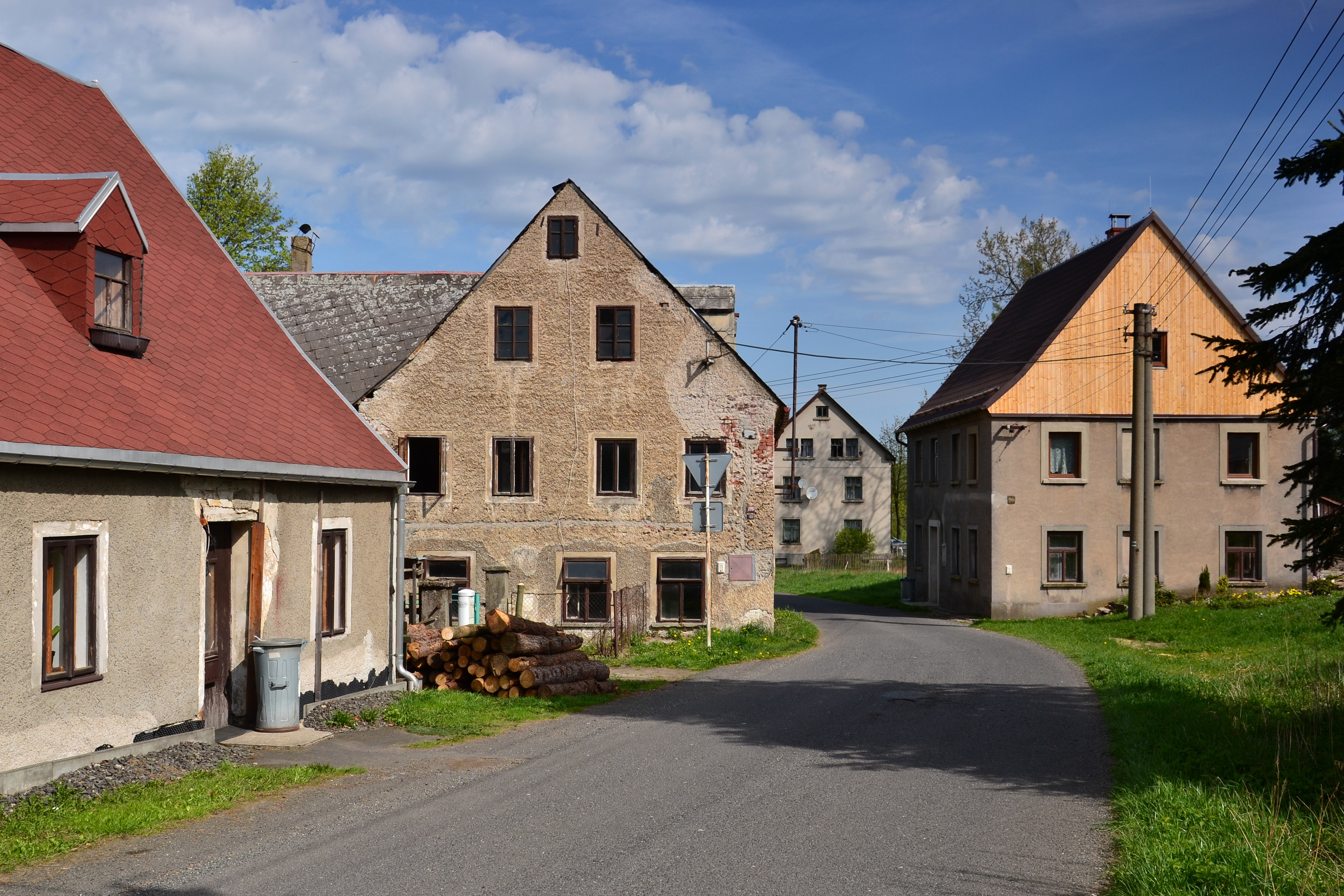 Nové Zvolání – domy v Horské ulici